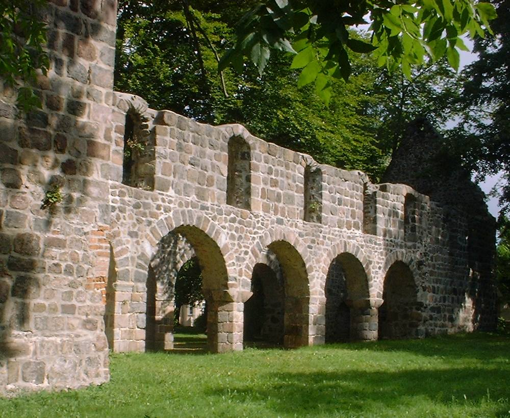 Ruine der ehemals dreischiffigen Basilika Unserer Lieben Frauen (12. Jh.) in Loburg